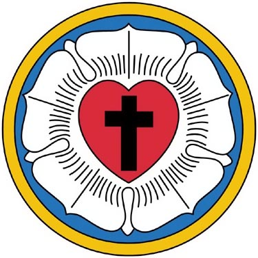 Malagasy: Loterana